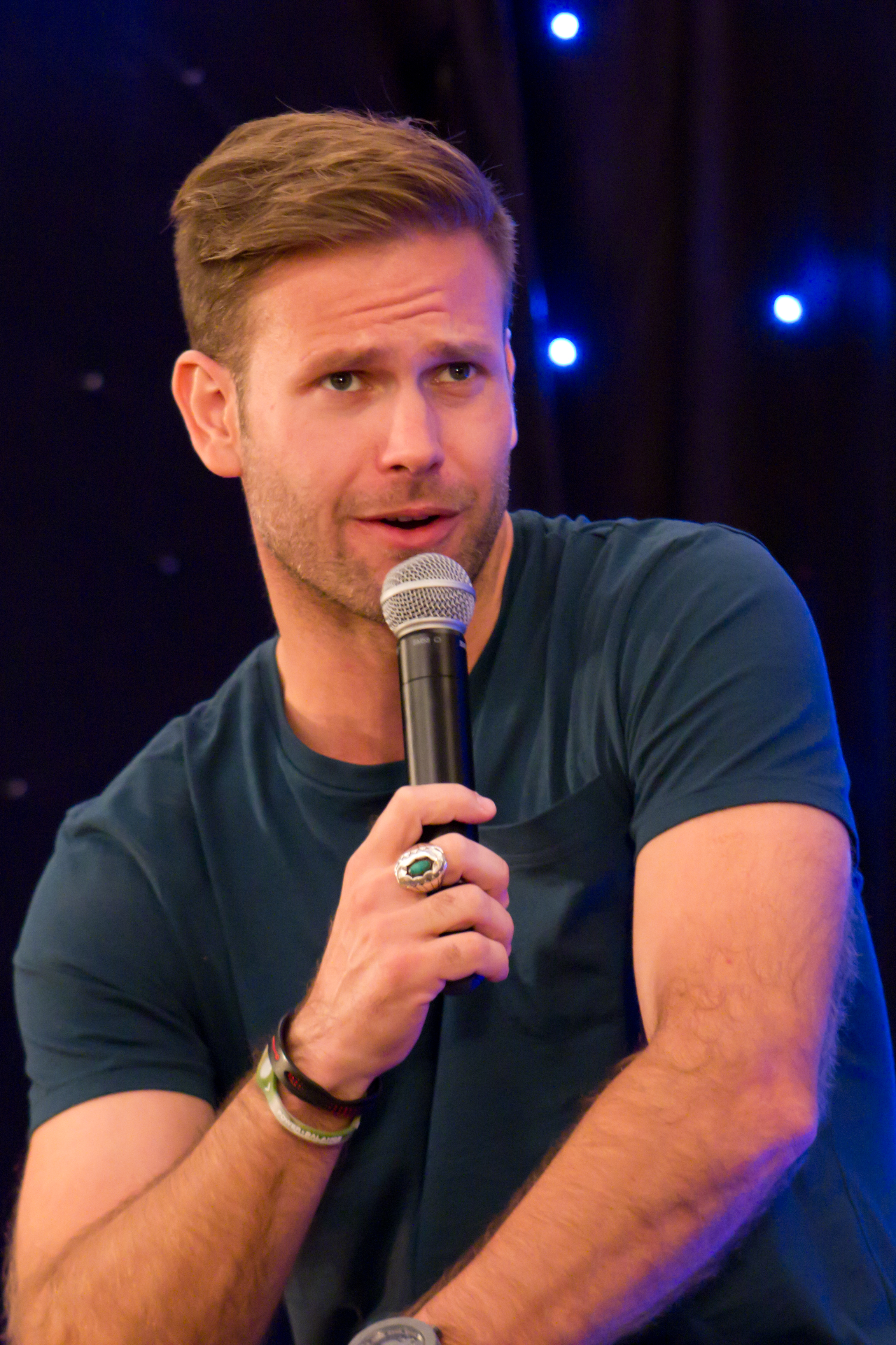 Matt Davis